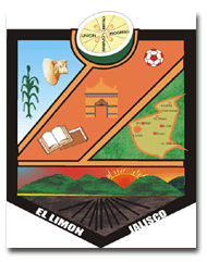 Escudo